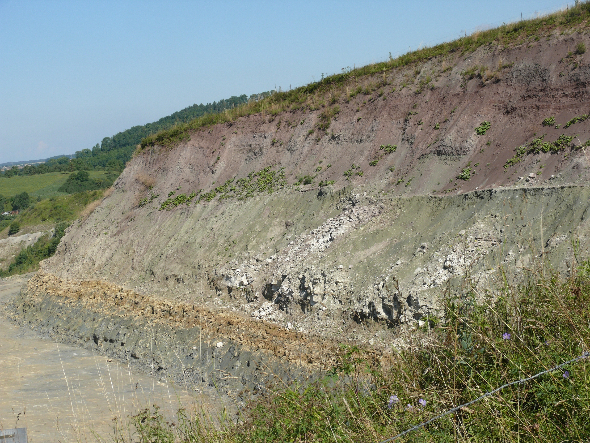 Grenzbereich Unterkeuper - Mittelkeuper* Mittelkeuper:-- Grabfeld-Formation mit Grundgips* Unterkeuper:-- Erfurt-Formation mit---- Grenzdolomit---- Grüne MergelSteinbruch bei Vellberg-Eschenau